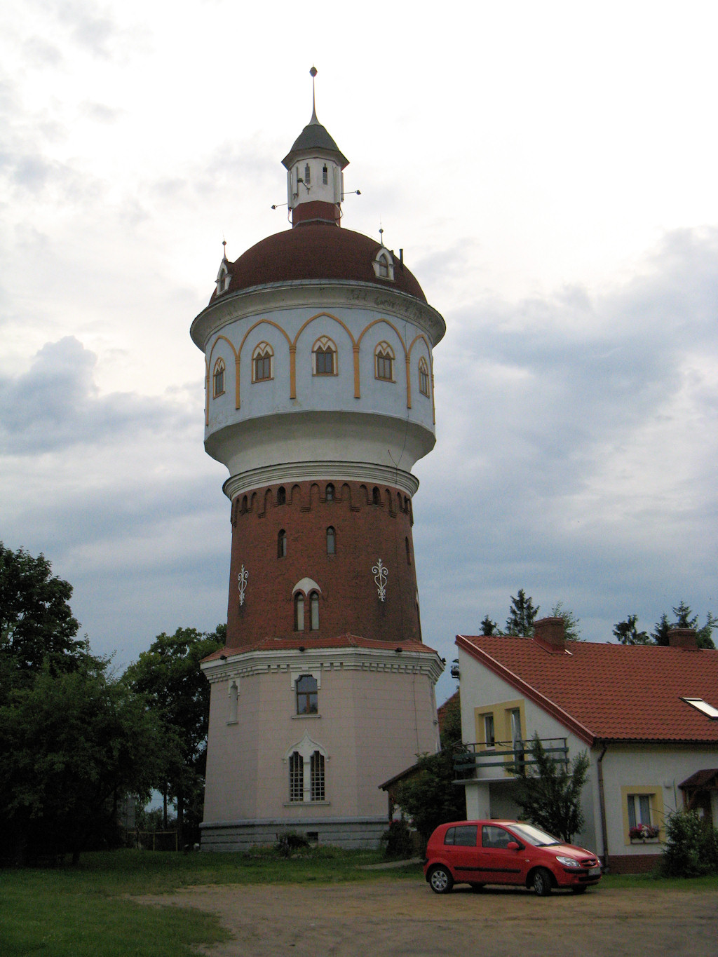 Wieża ciśnień w Ełku